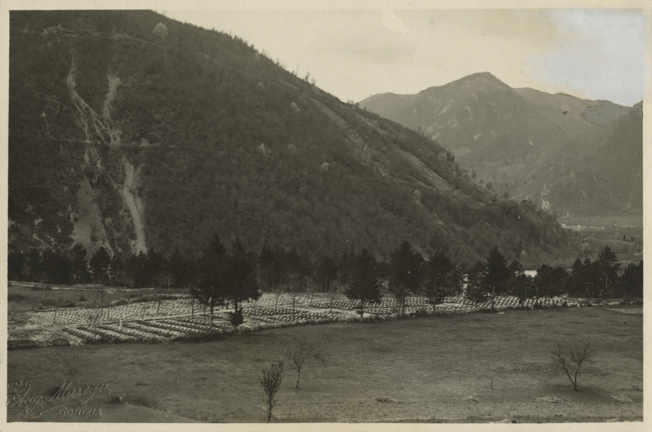 Tolmino-Slovenia, cimitero Germanico